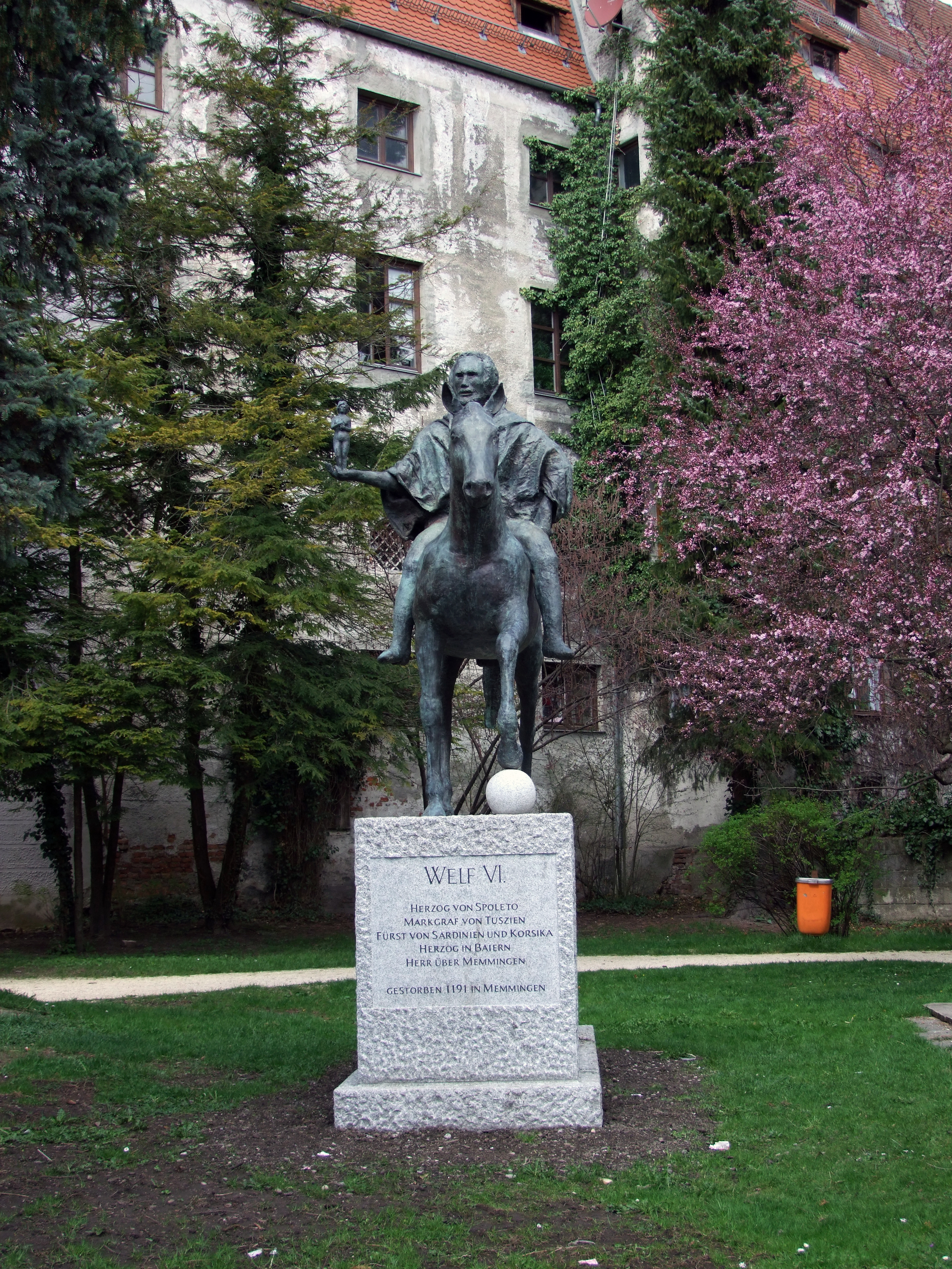 Reiterstandbild vom Milden Welf im oberschwäbischen Memmingen.